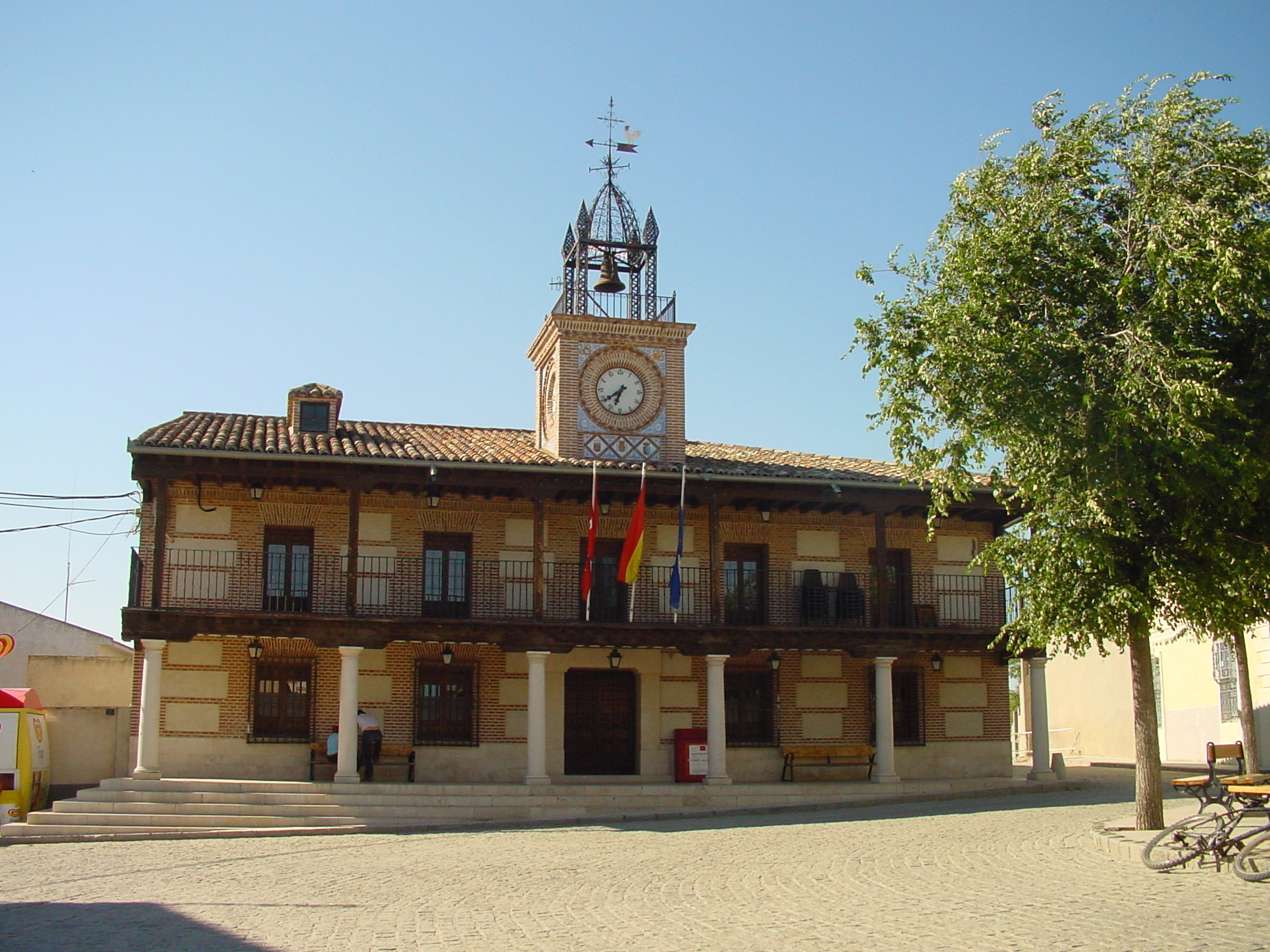 Ayuntamiento de Casarrubuelos.